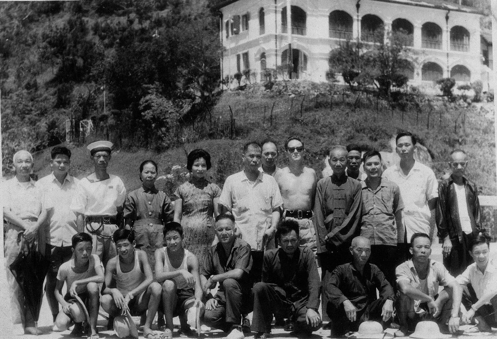 中文（香港）: 64年大澳差館，歡送華探梁德林榮休